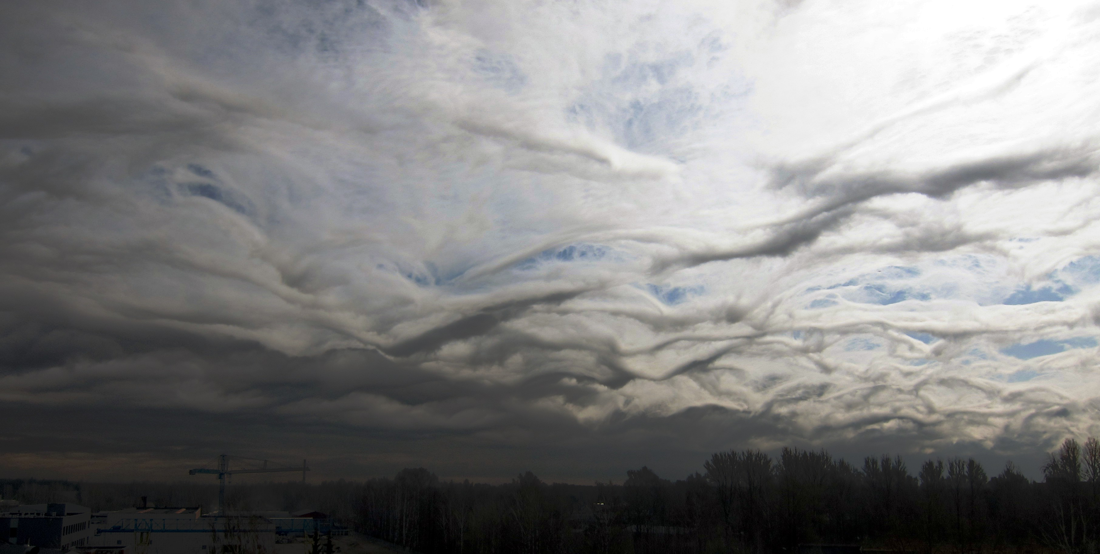 Asperitas tipa mākoņi Rīgā